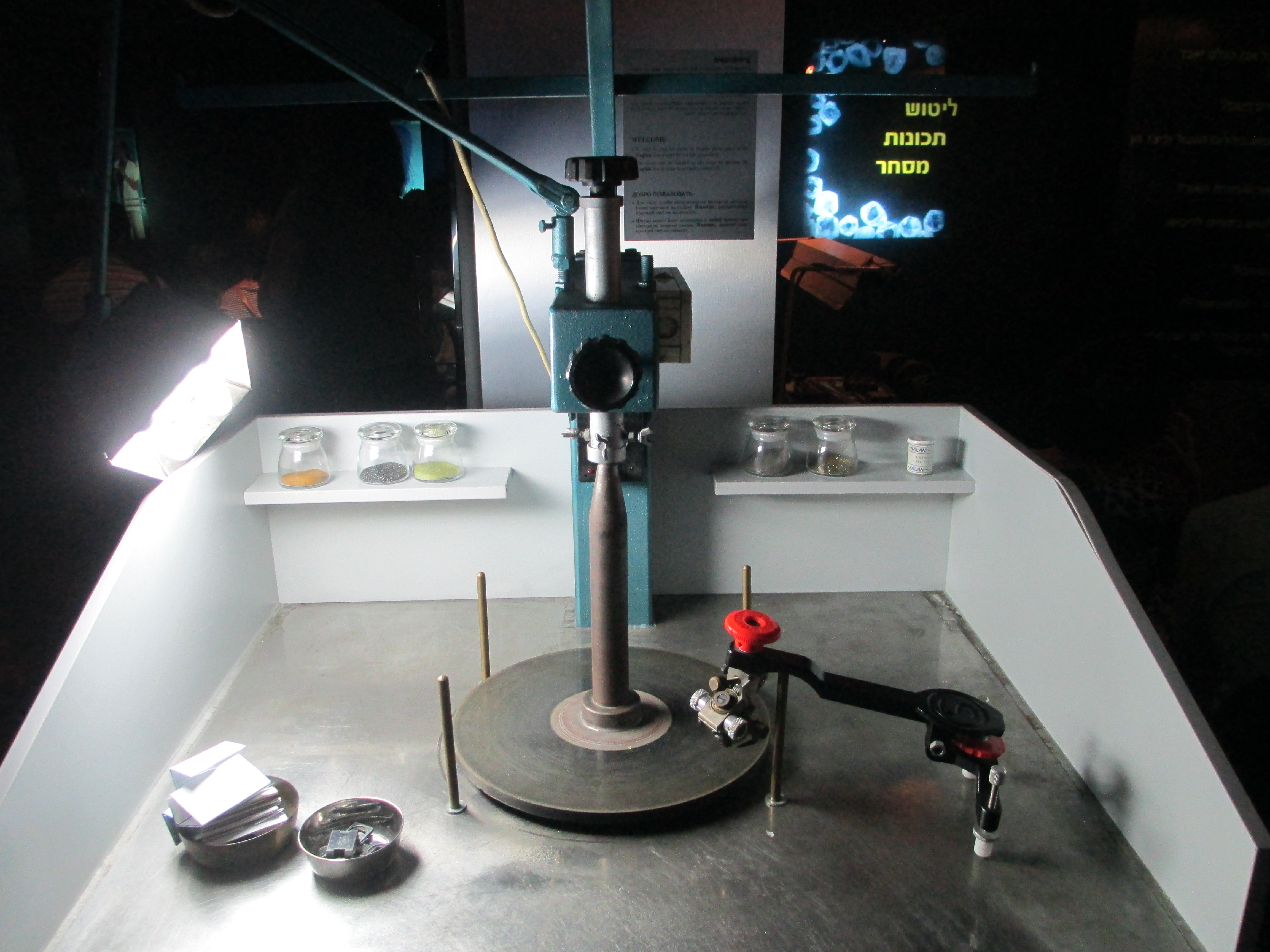 מוזיאון היהלומים ברמת גן